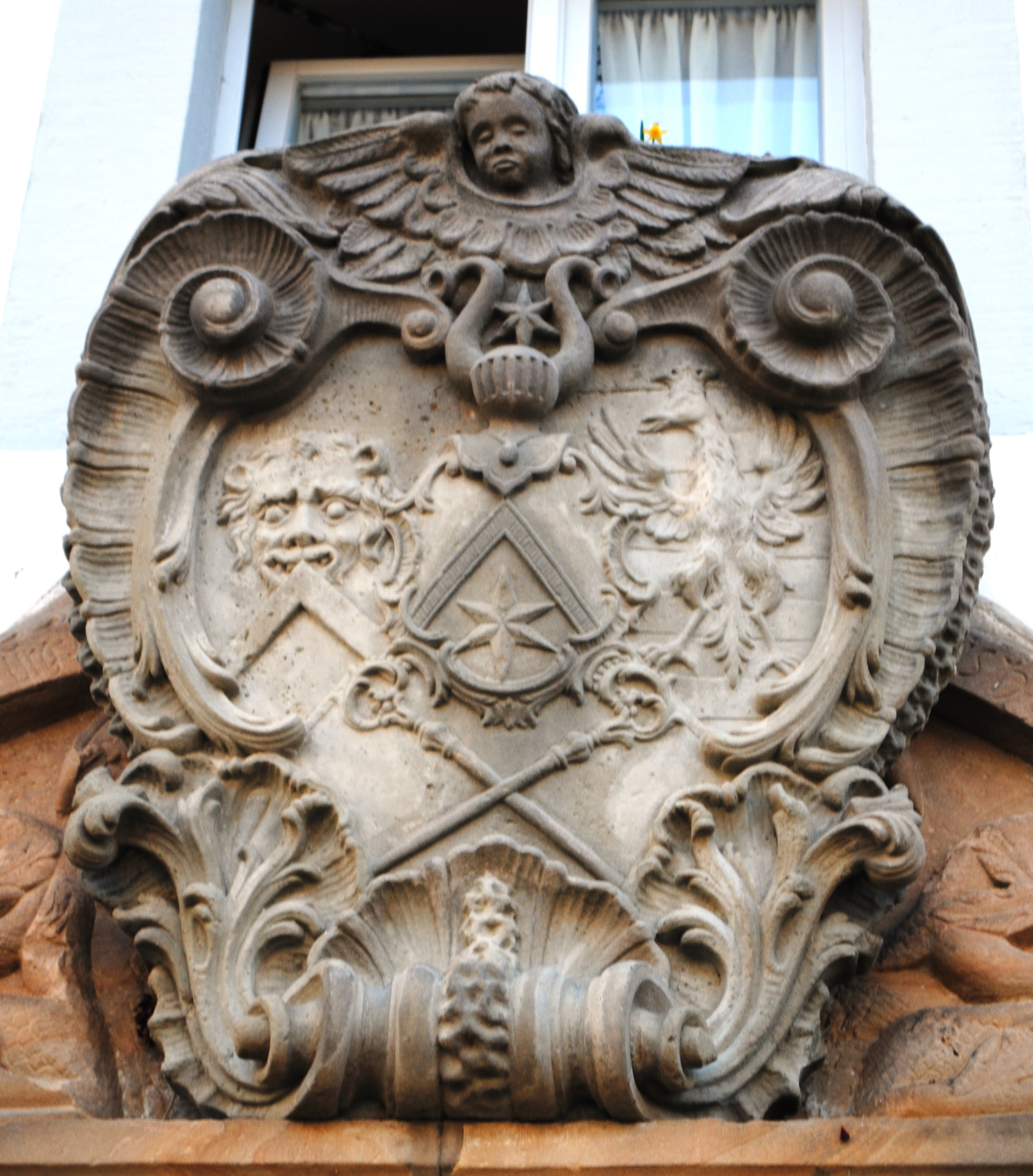 Wappen, Dominicus Otto, Rathaus, Prichsenstadt-Stadelschwarzach